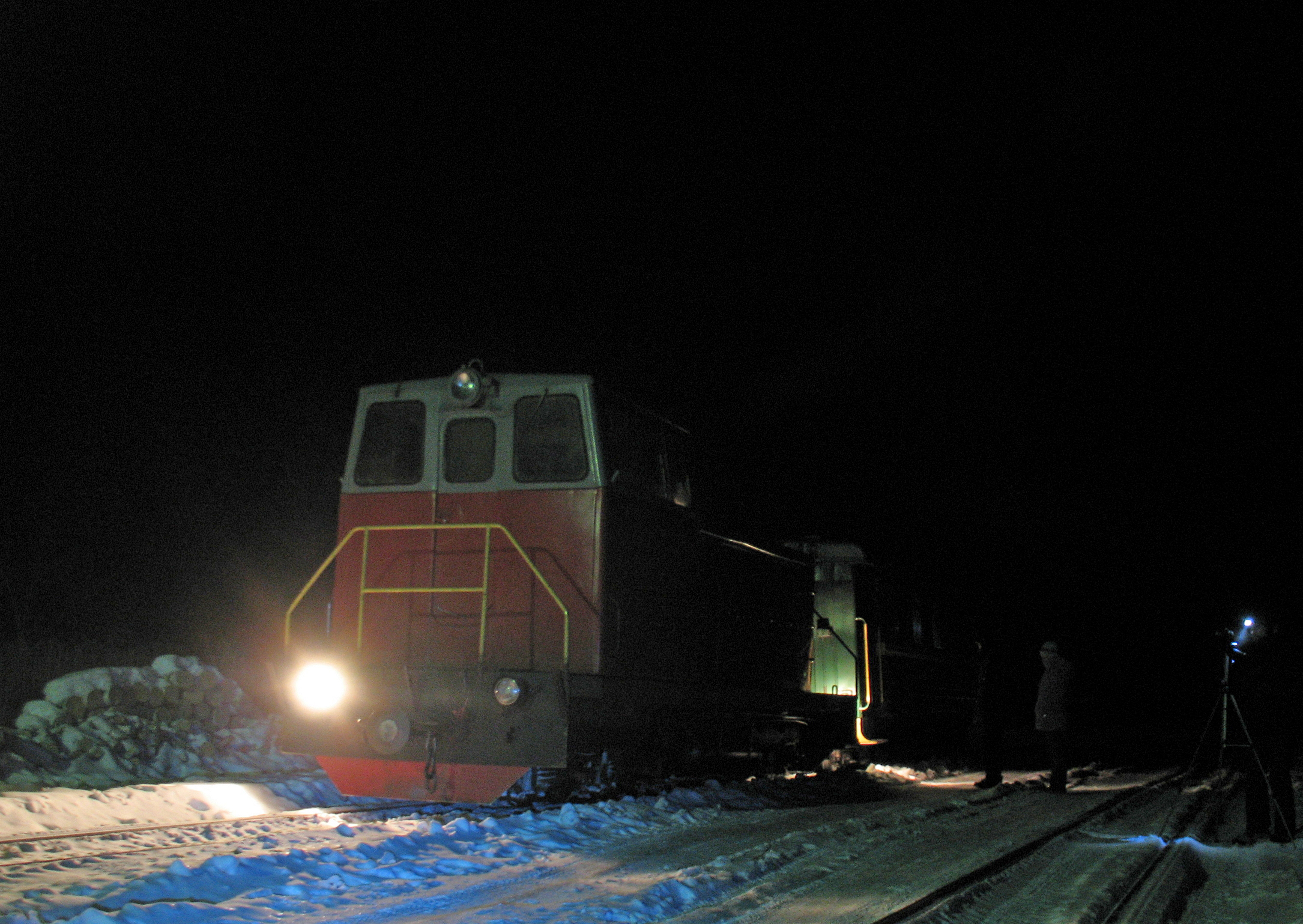 Ride on narrow gauge railway Tumskaya - Golovanova dacha at night passenger train. TU7A-2895 with one car. Line operated by RZD, and closed in april 2008. Поездка на ночном поезде по узкоколейной железной дороге Тумская - Голованова дача. Тепловоз ТУ7А-2895. Линия принадлежала РЖД, и была закрыта в апреле 2008 года.